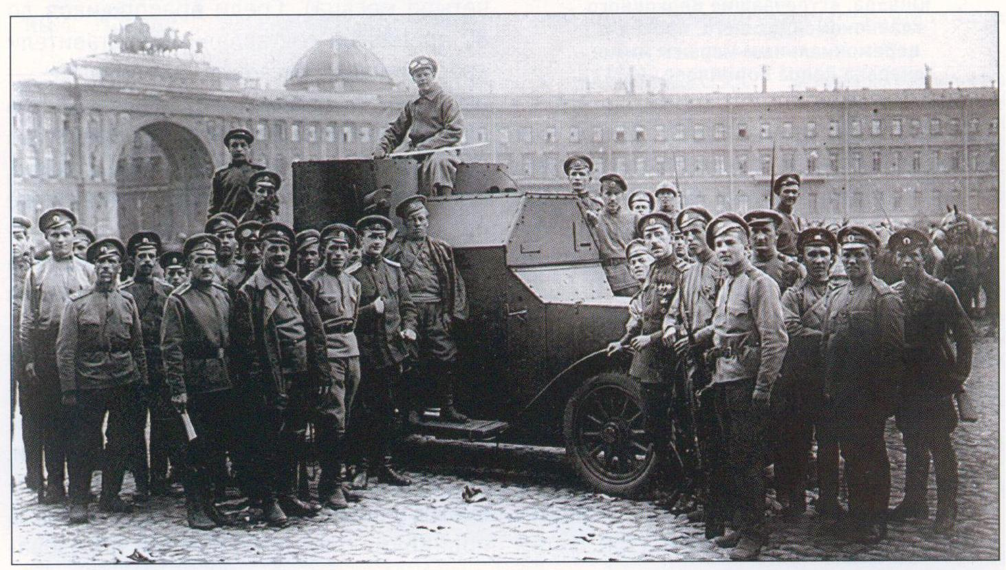 Бронеавтомобиль "Остин" первой серии британского производства и юнкера на Дворцовой площади Петрограда. Сзади слева видна арка Главного штаба. 1917